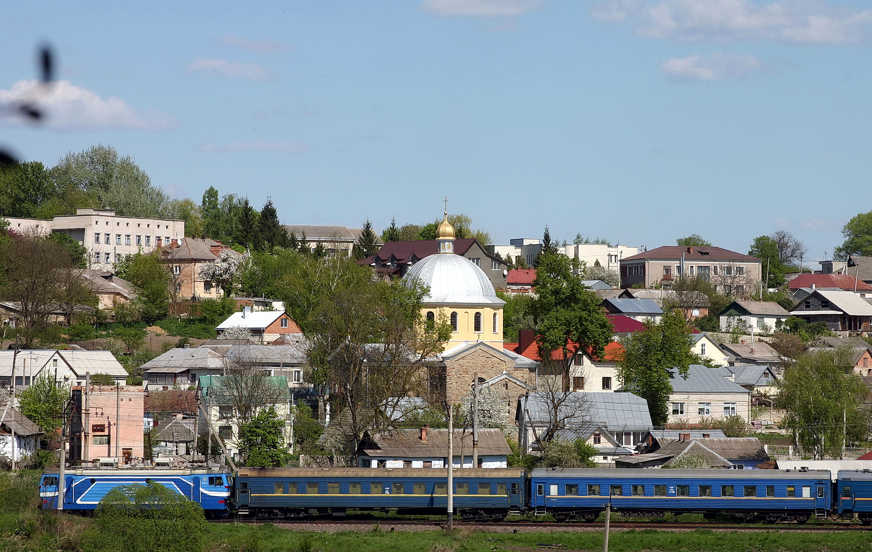 De mayo paisaje Velyki Borky